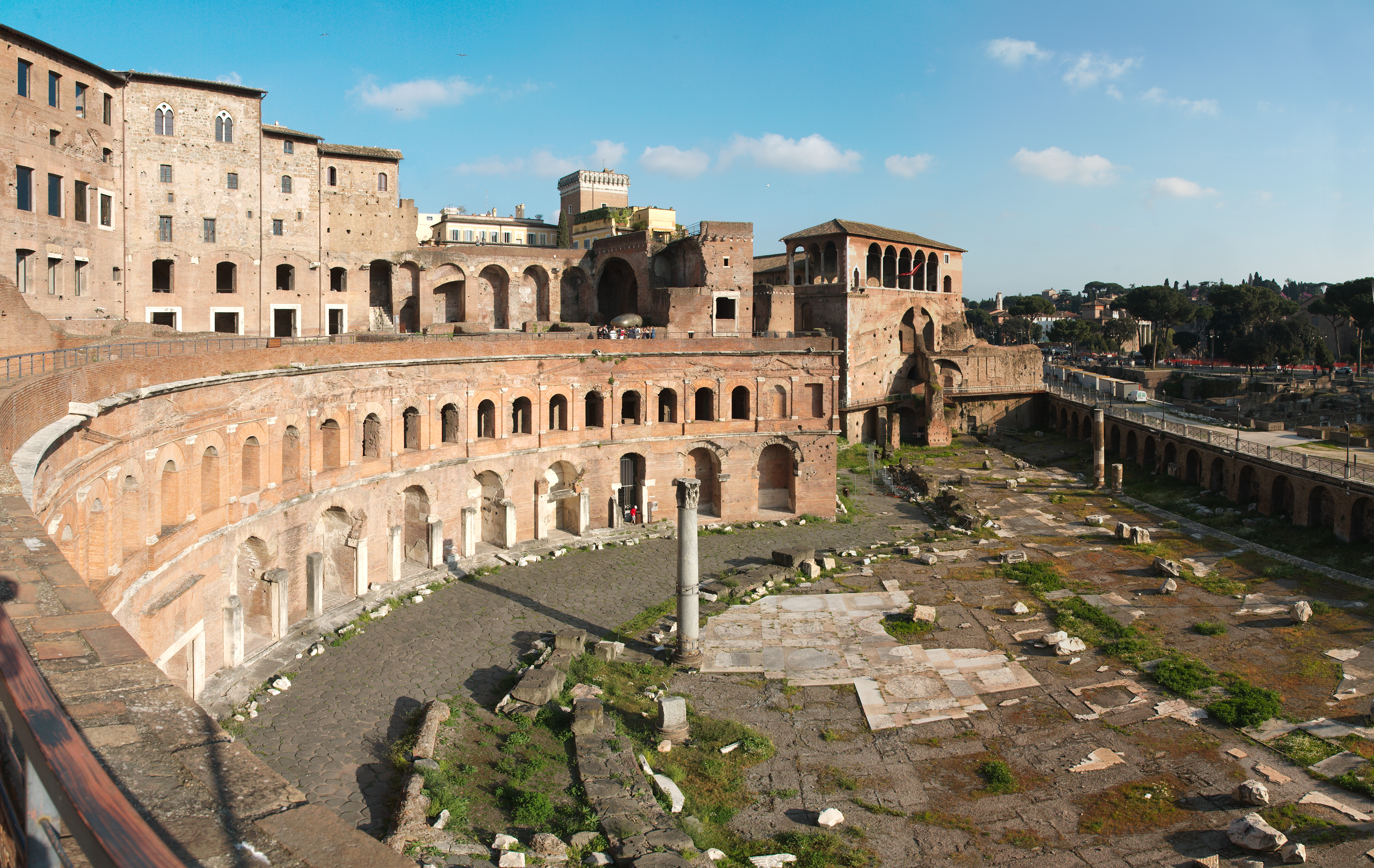 Trajans market